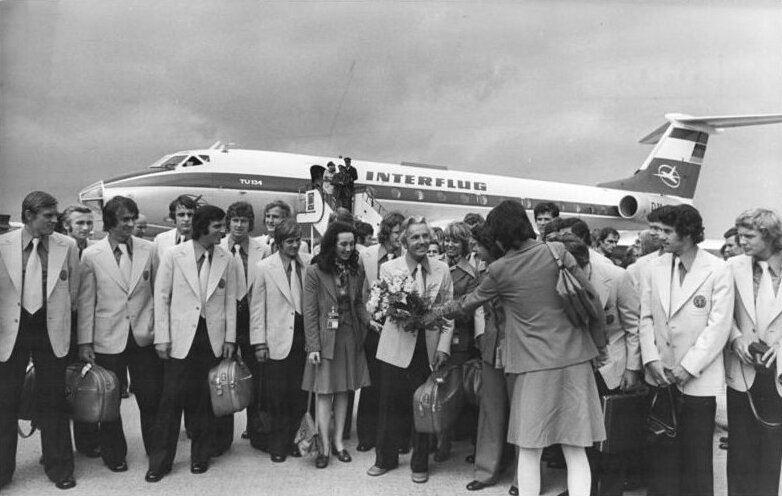 ADN-ZB-Mittelstädt-11.6.74-ma-BRD-Hamburg: Fußball-Weltmeisterschaft 1974 - DDR-Fußballer in der BRD eingetroffen- Mit einer TU-134 der Interflug traf die Fußball-Nationalmannschaft der DDR am Mittag des 11.6.74 in Hamburg zur Teilnahme an der am 13.6.74 in der BRD beginnenden Weltmeisterschaft ein. Hostessen überreichten Trainer Georg Buschner (Bildmitte) Blumen zur Begrüßung. Rechts daneben Eberhard Vogel und Gerd Kische. Von links: "Kapitän" Bernd Bransch, Siegmar Wätzlich, Harald Irmscher, Jürgen Croy, Wolfgang Seguin, Werner Friese, Hans-Jürgen Kreische und Konrad Weise."